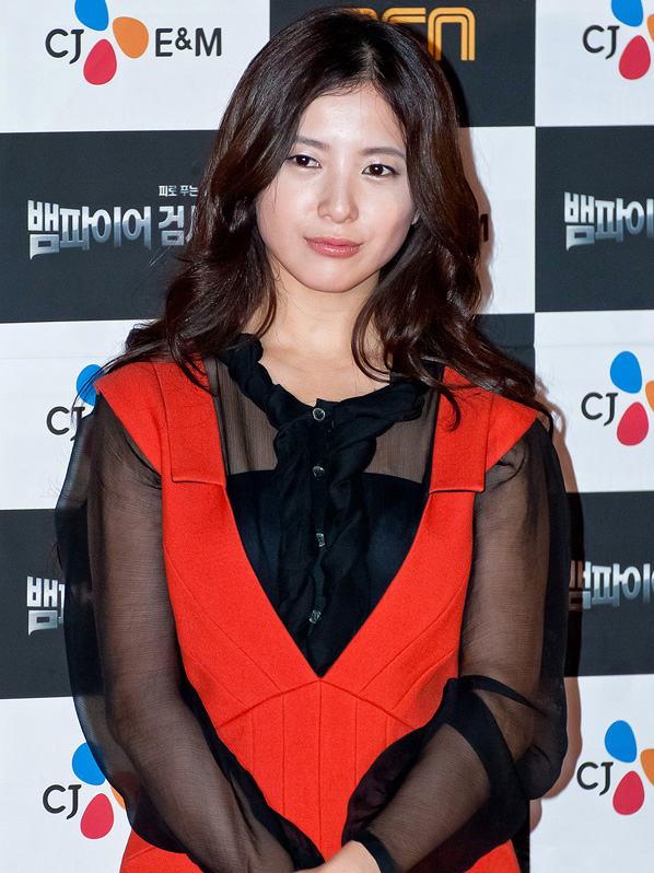 OCN 뱀파이어검사 시즌 2 시사 및 제작발표회에 참석한 요시타카 유리코